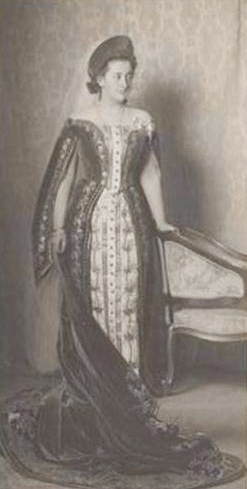 Милорадович Ольга Леонидовна (1894-1931)